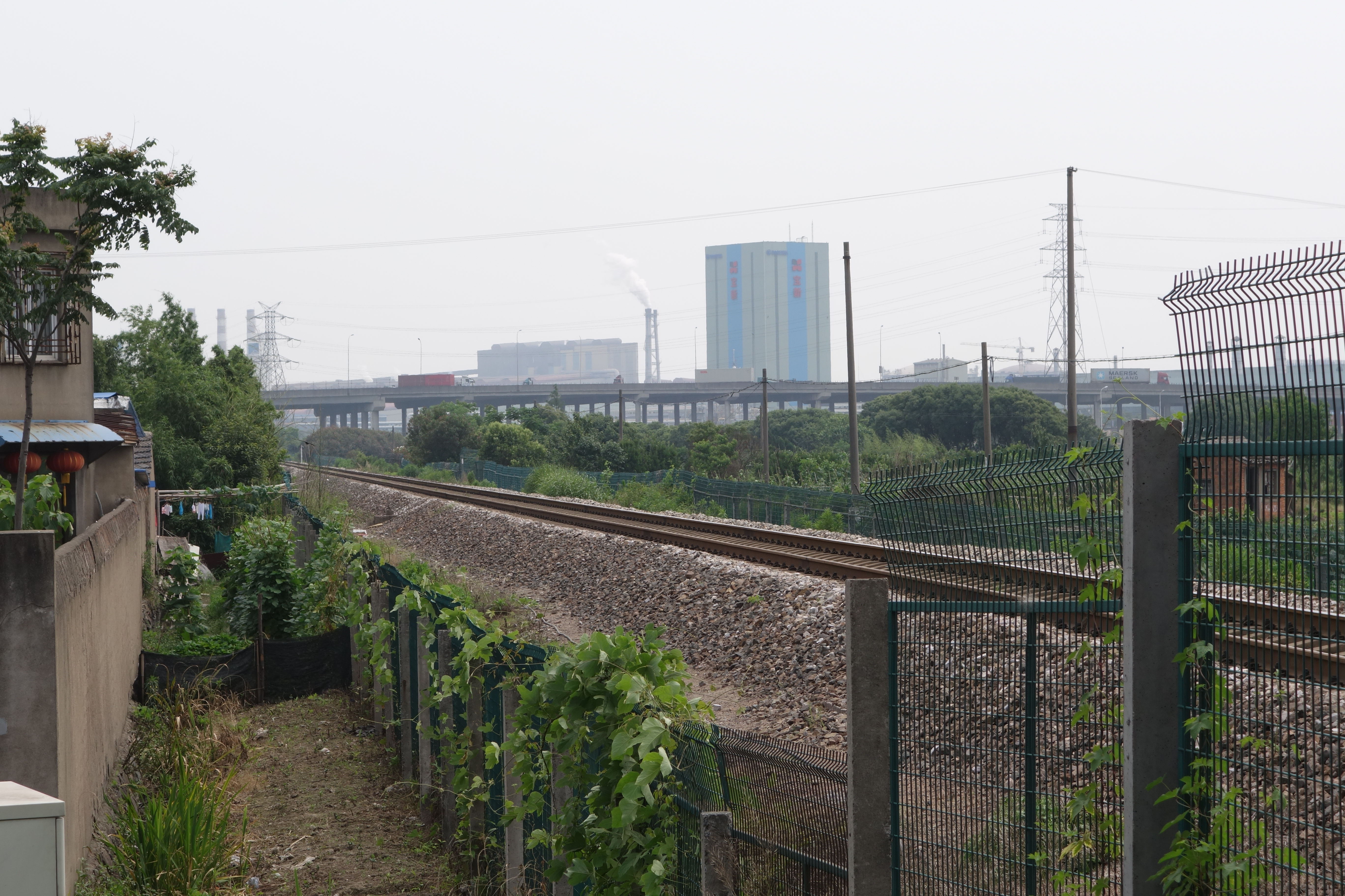 北仑铁路支线霞浦街道段